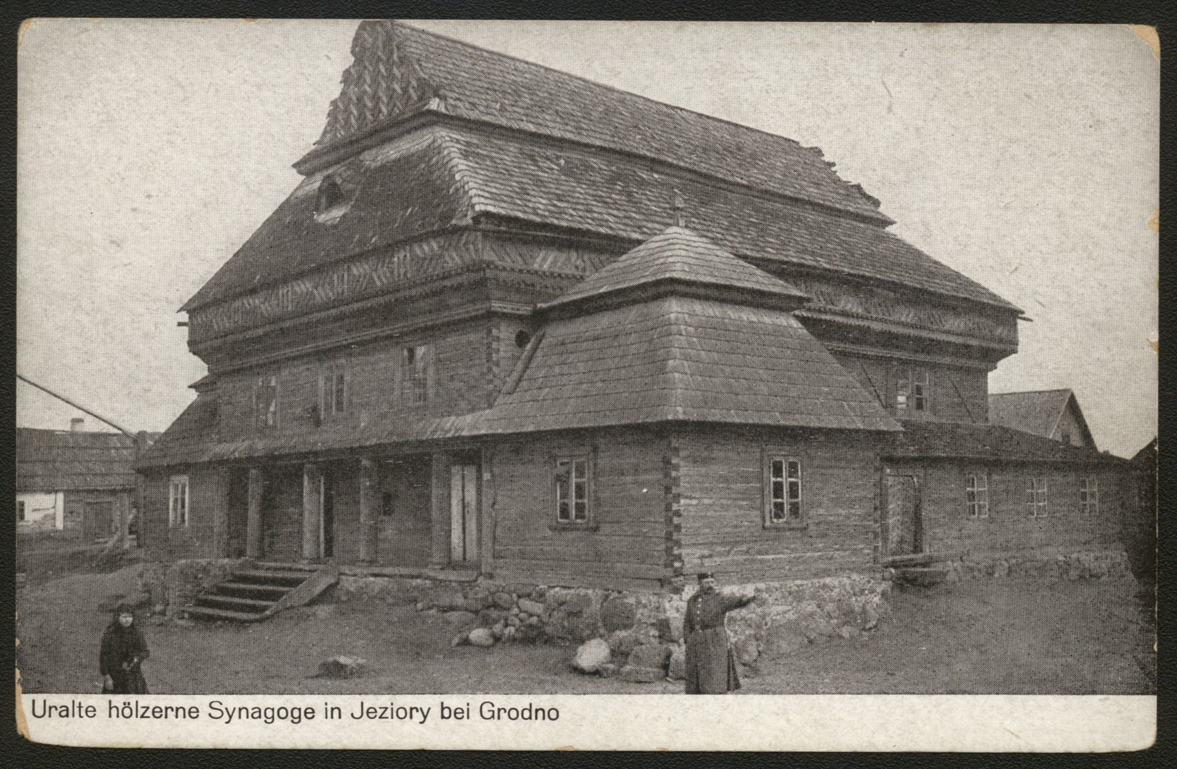 Беларуская (тарашкевіца): Азёры (Aziory). Сынагога